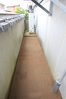 固まる土を用いた後